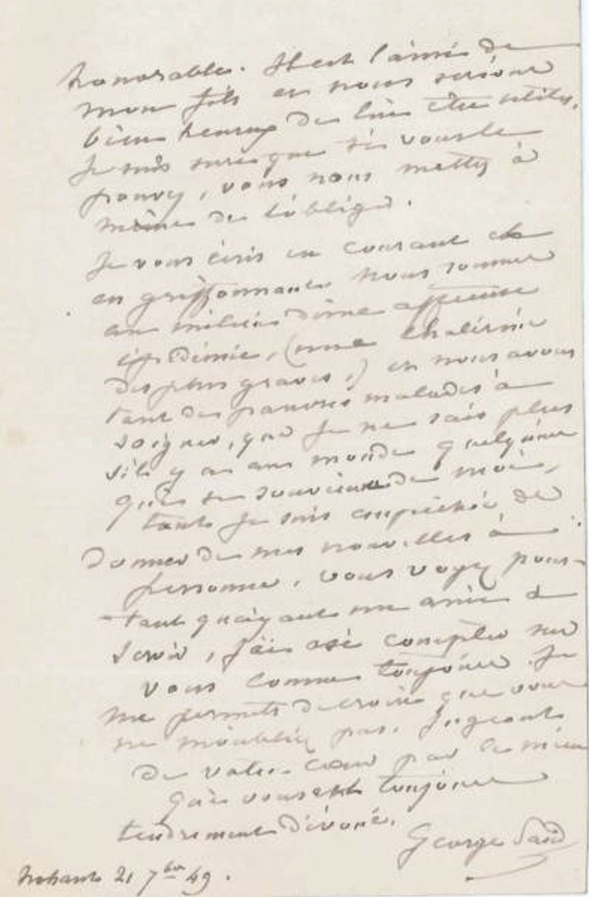 Lettre en date du 21 septembre 1849, de George Sand à son ami, Édouard Charton (1807-1890), journaliste, directeur de publications et homme politique français. La romancière plaide pour le peintre et dessinateur Léon Villevieille (1826-1863).